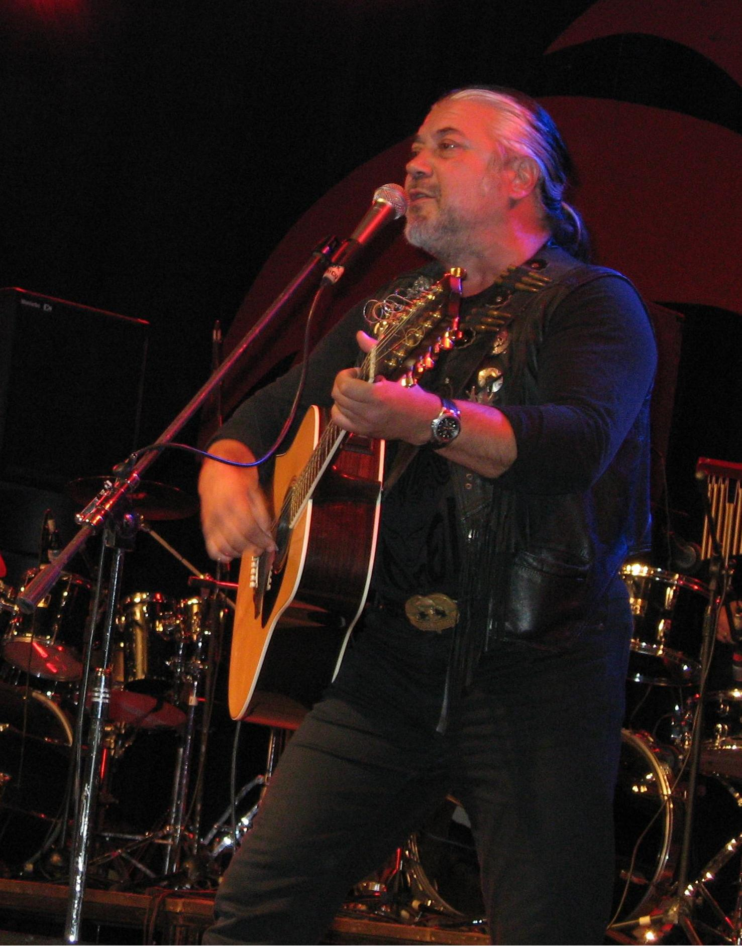 Nicu Covaci, concert al formației Phoenix, 17 noiembrie 2006.